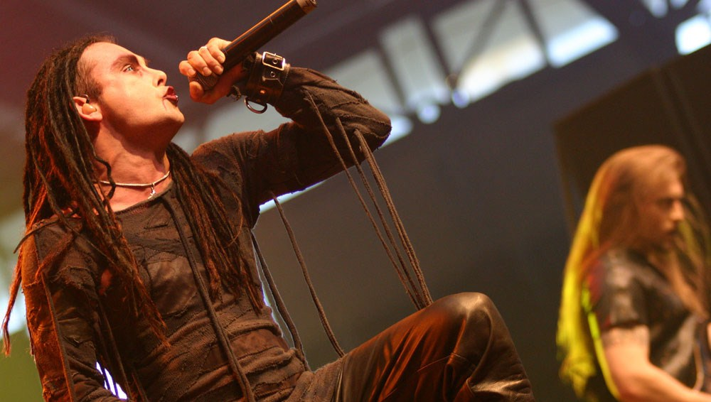 Cradle of Filth actuando en el Earthshaker Fest en Alemania.